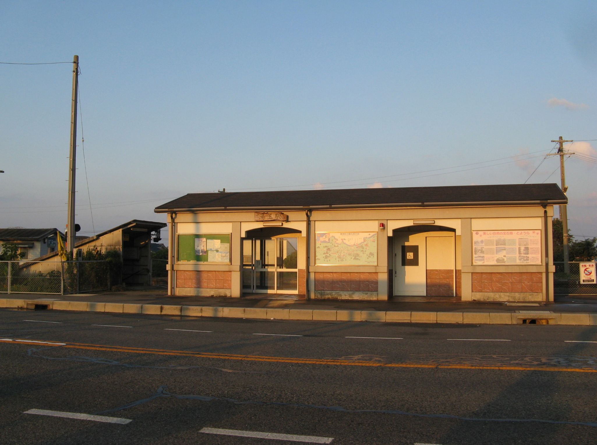 山陰本線湯玉駅 駅舎 2009年10月16日 Bakkai撮影 Category:西日本旅客鉄道の鉄道駅画像 Category:下関市の画像